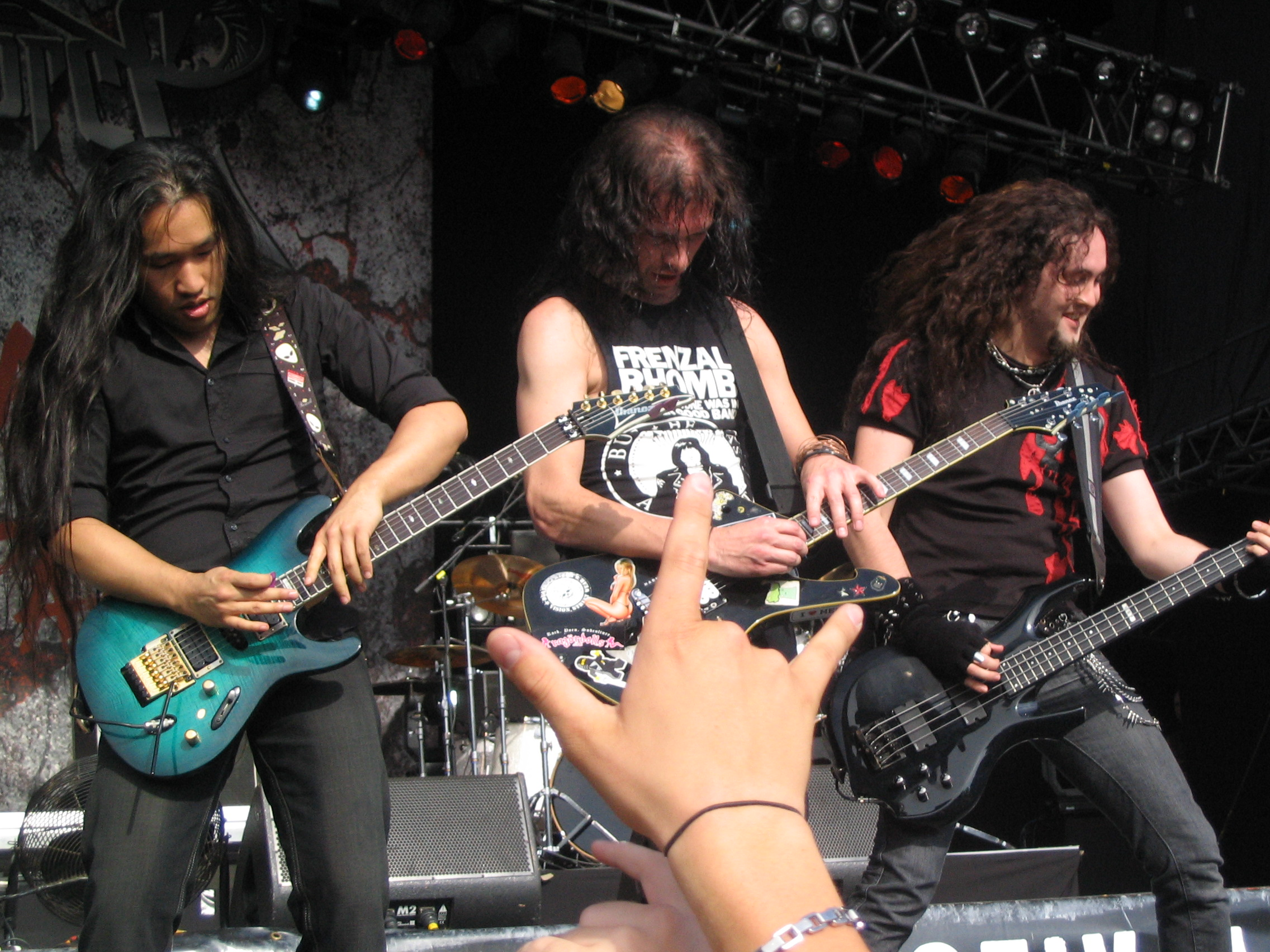 Description